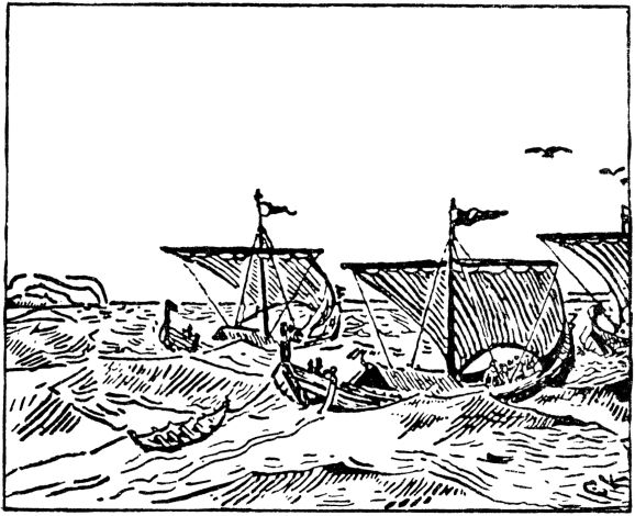 Christian Krogh: Illustration for Olav Tryggvasons saga, Heimskringla 1899-edition. nn: «Harald Gråfell for til Danmark om sommaren.» nb: «Harald Gråfell drog til Danmark om sommeren.»